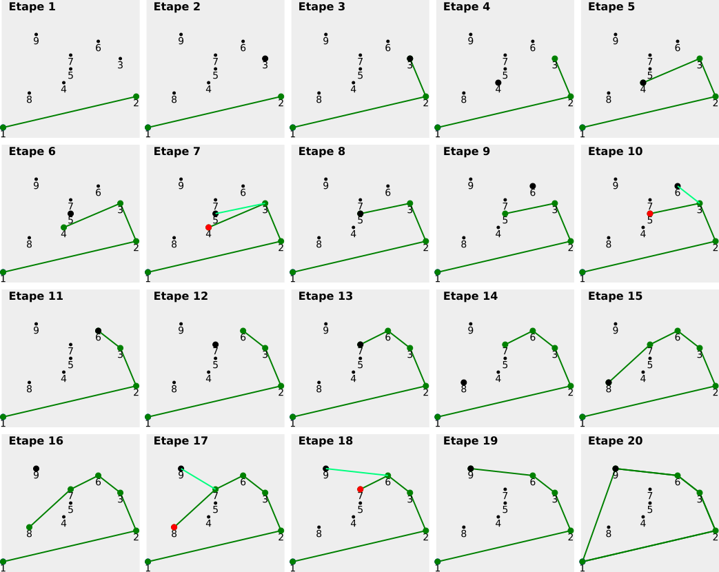 Exemple du parcours de Graham